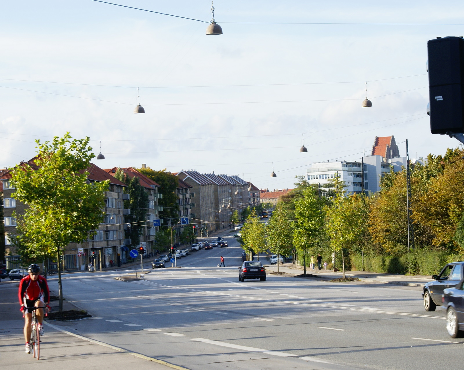 Tagensvej in Copenhagen from Bisbebjerg Station towards Bispebjerg